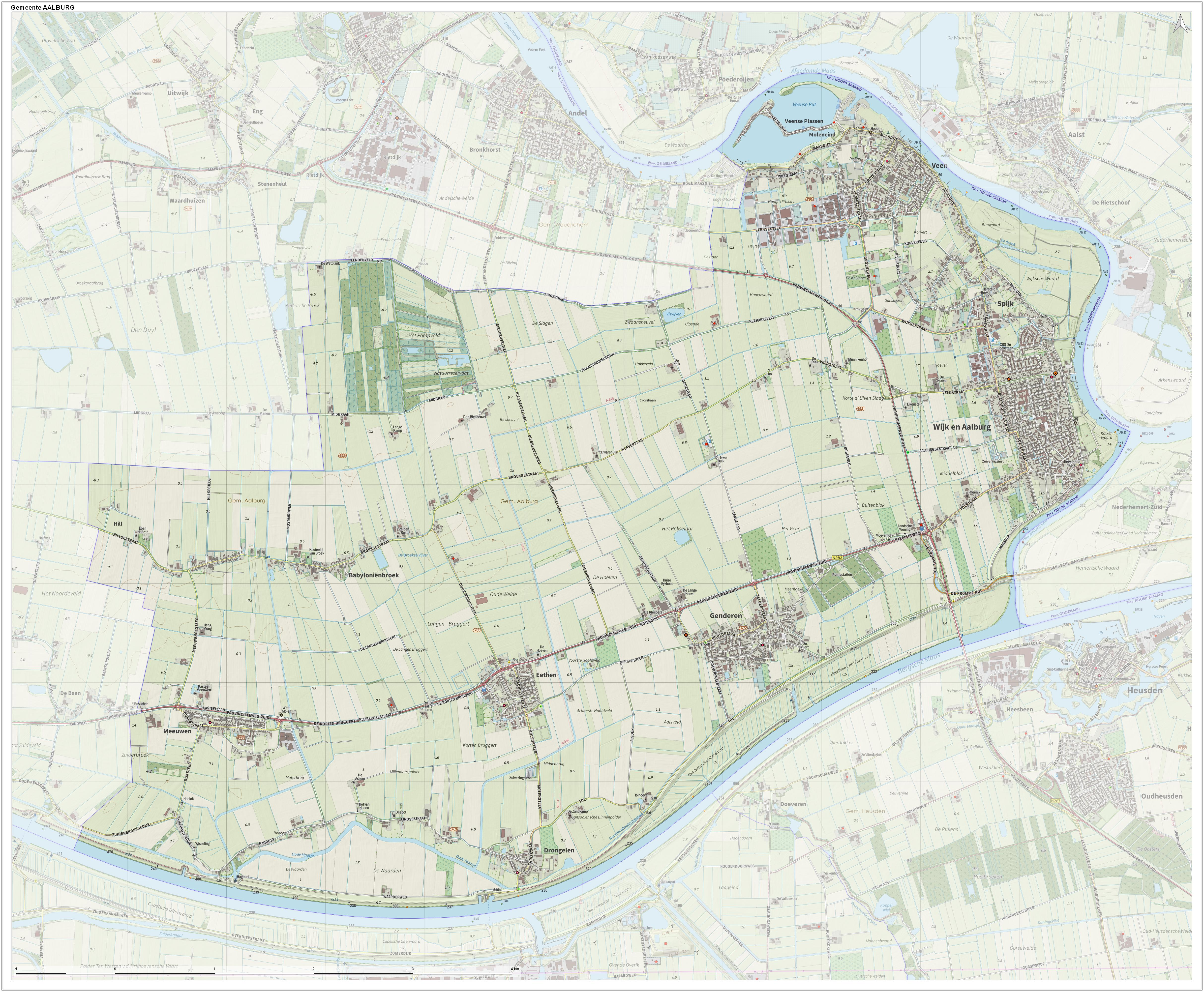 Topografische gemeentekaart. Resolutie: 400 pixels/km. Kaartbeeld samengesteld uit de open geodata van de Top10NL en Top25namen (Kadaster), Creative Commons-BY licentie. Gebouwvlakken uit open geodata BAG extract. Wegen uit de OpenStreetMap, OpenStreetMap community. Reliëfschaduw uit de Actuele Hoogtekaart AHN2. Samenstelling en kleurenschema: Jan-Willem van Aalst, met QGIS. Zie ook de Legenda.